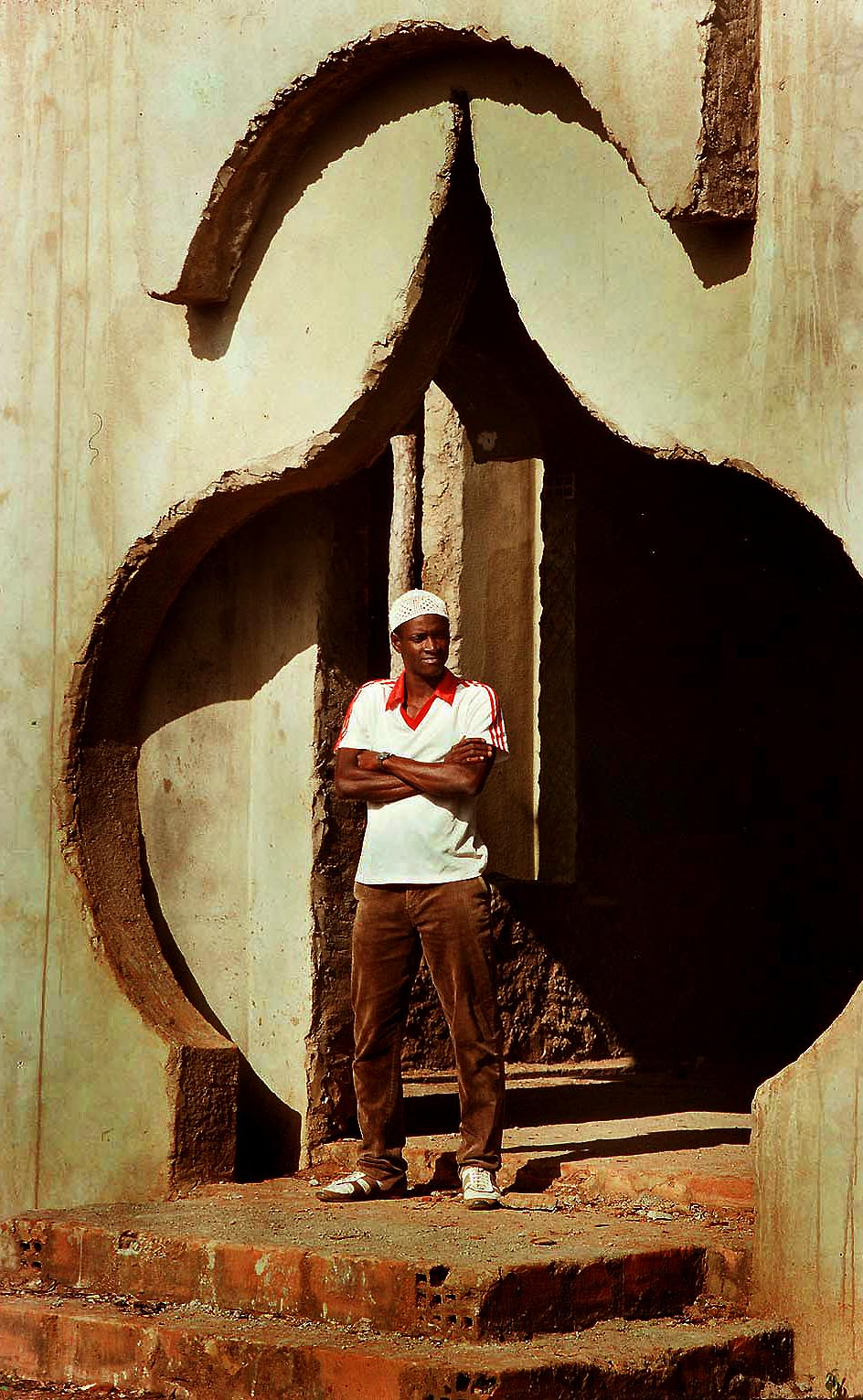 Arch of a mosque in MozambiqueMozambique